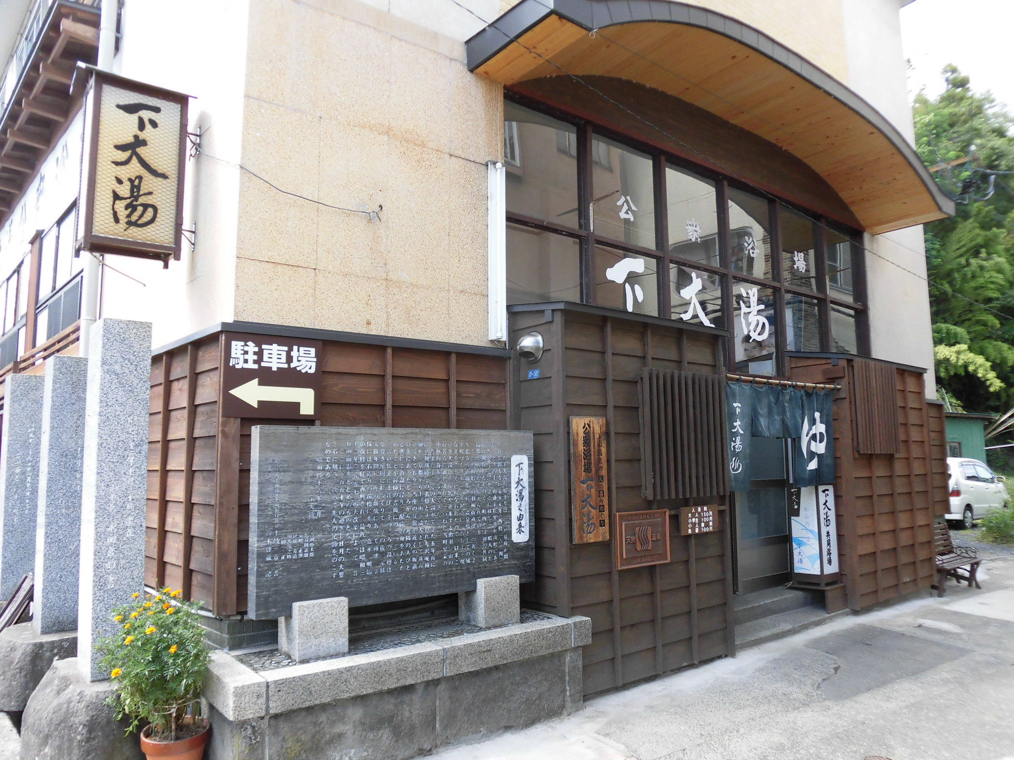 上山温泉の公衆浴場、下大湯。山形県上山市十日町に所在（十日町温泉）。